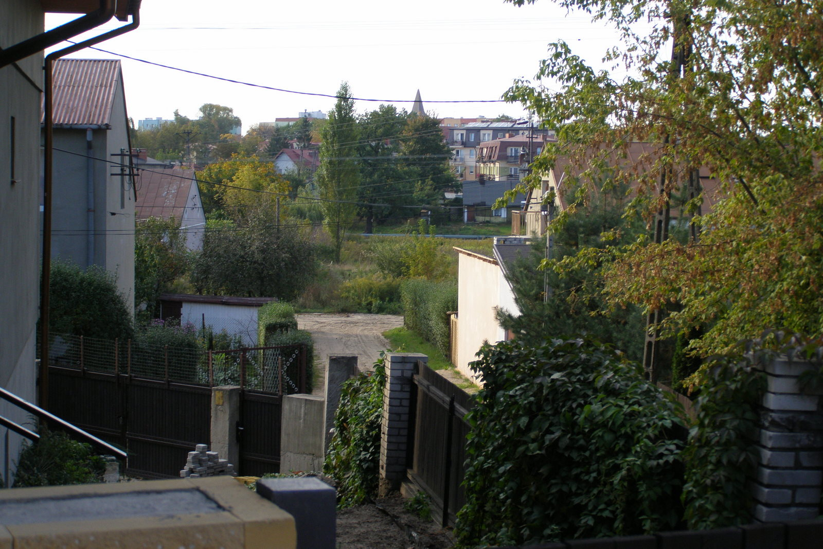 Former Górki Village in Mińsk Mazowiecki / Dawna wieś Górki w Mińsku Mazowieckim